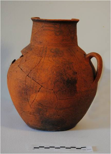 Una de les gerres trobades a la cuina andalusí